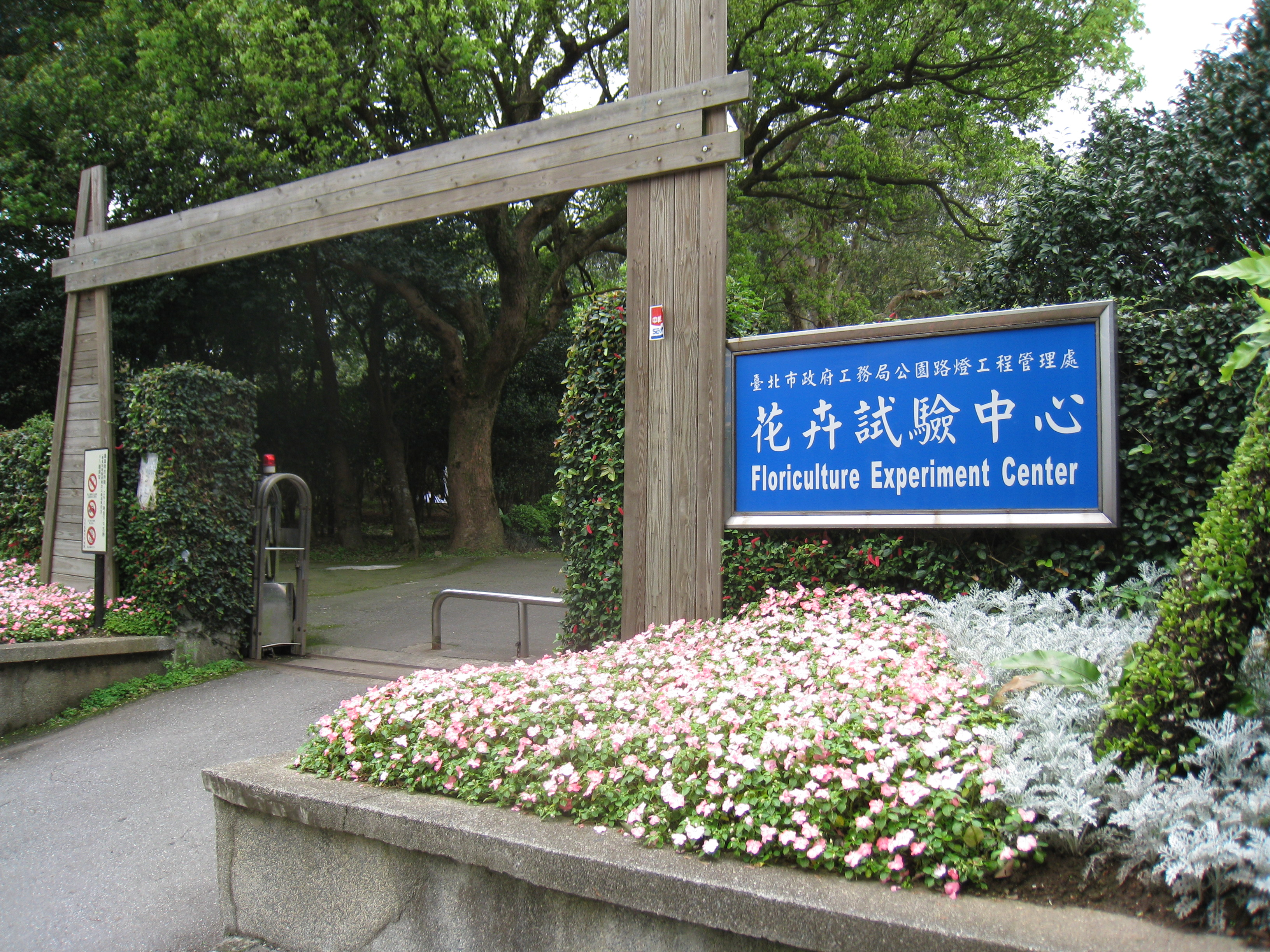 臺北市政府工務局公園路燈工程管理處花卉試驗中心，位於臺北市士林區仰德大道四段175巷32號。